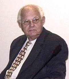 O Professor Ignacy Sachs coordena Seminário "Política Geral de Emprego - Necessidades, Opções e Prioridades", organizado pela OIT, PNUD e o governo brasileiro, com apoio da CNI/SESI e do IPEA. Brasília, 10 de dezembro de 2004.